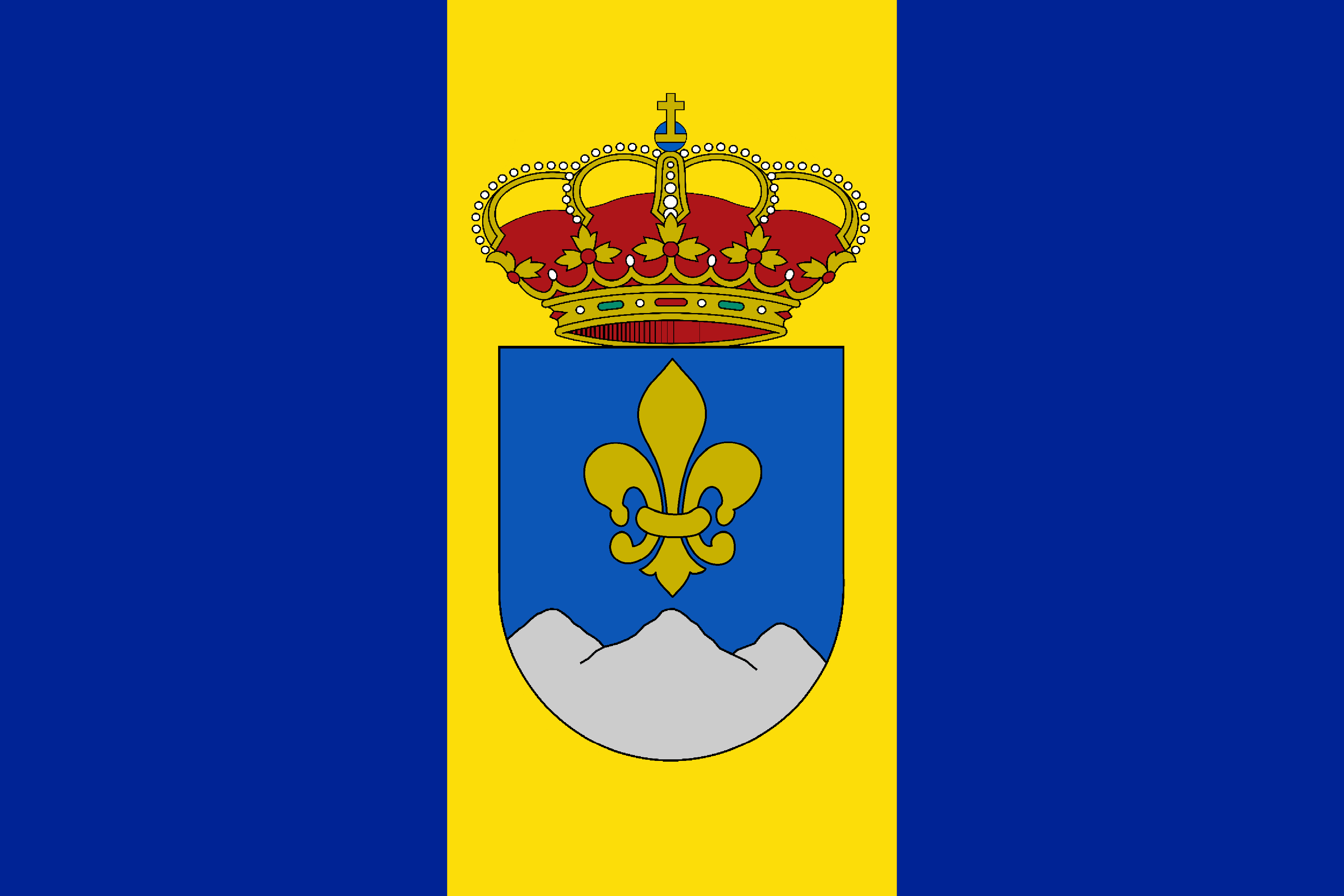 BANDERA OFICIAL DE GASCUEÑA